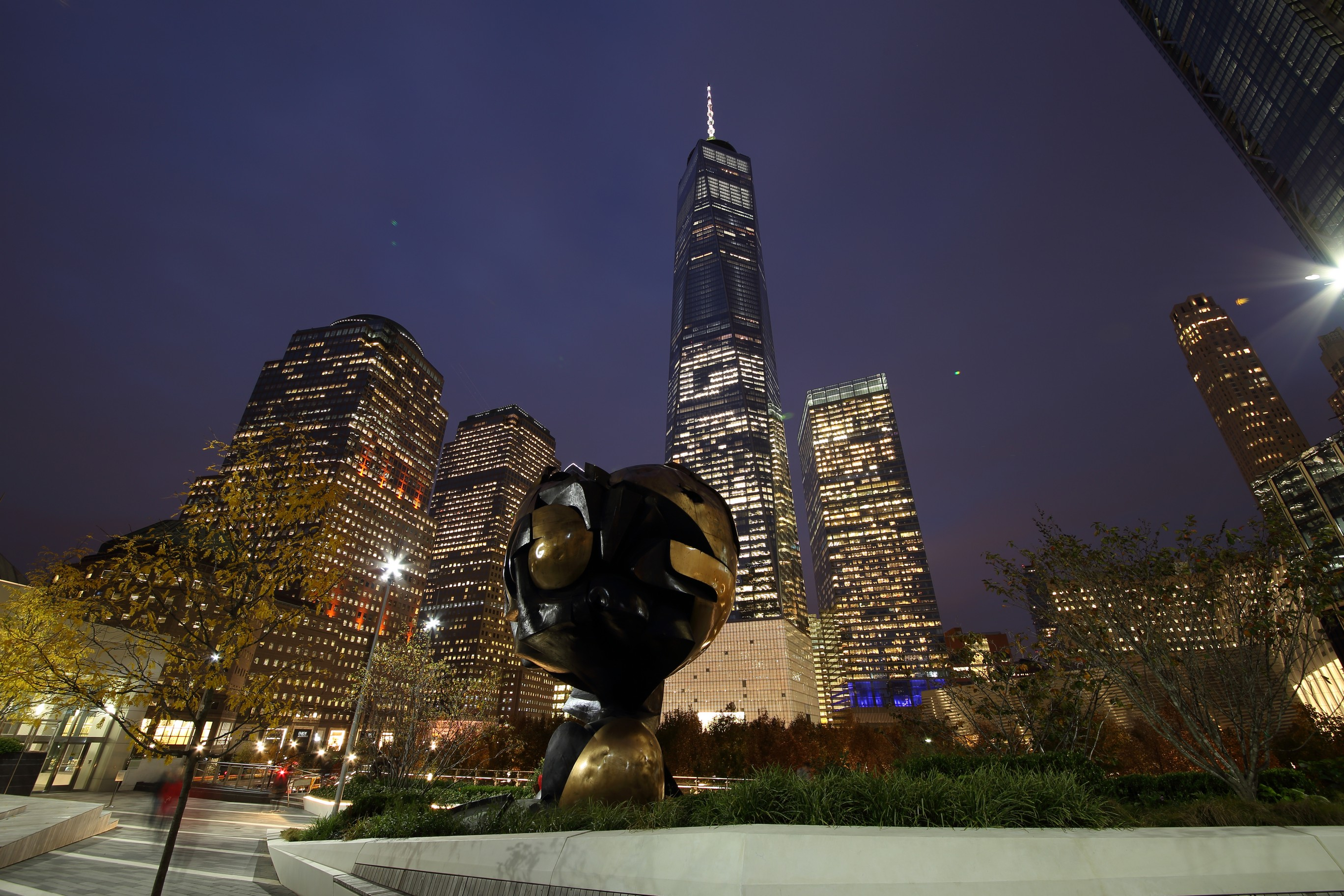 The Sphere am heutigen Standort im Liberty Park direkt neben dem World Trade Center-Komplex